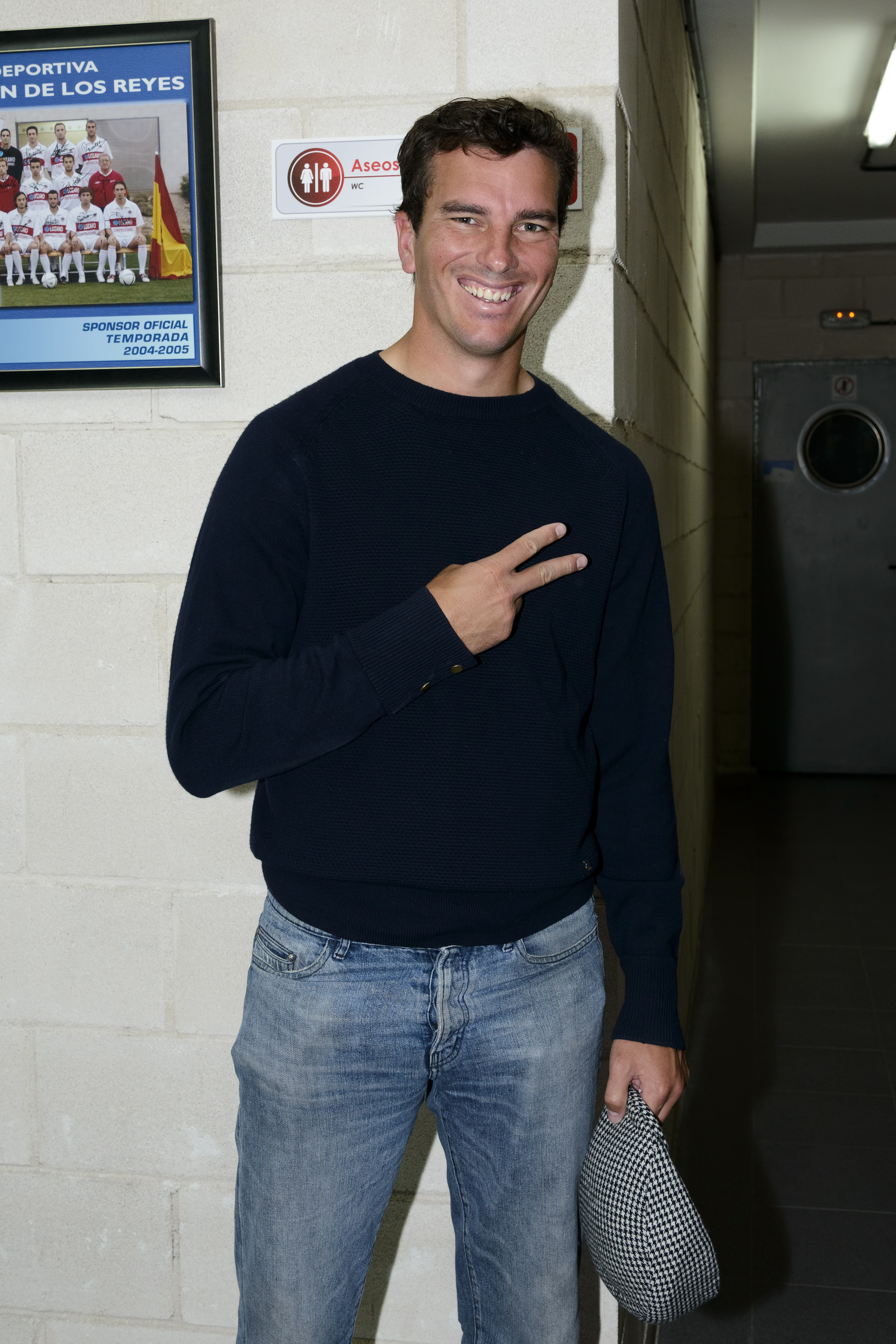 Francisco Pavón